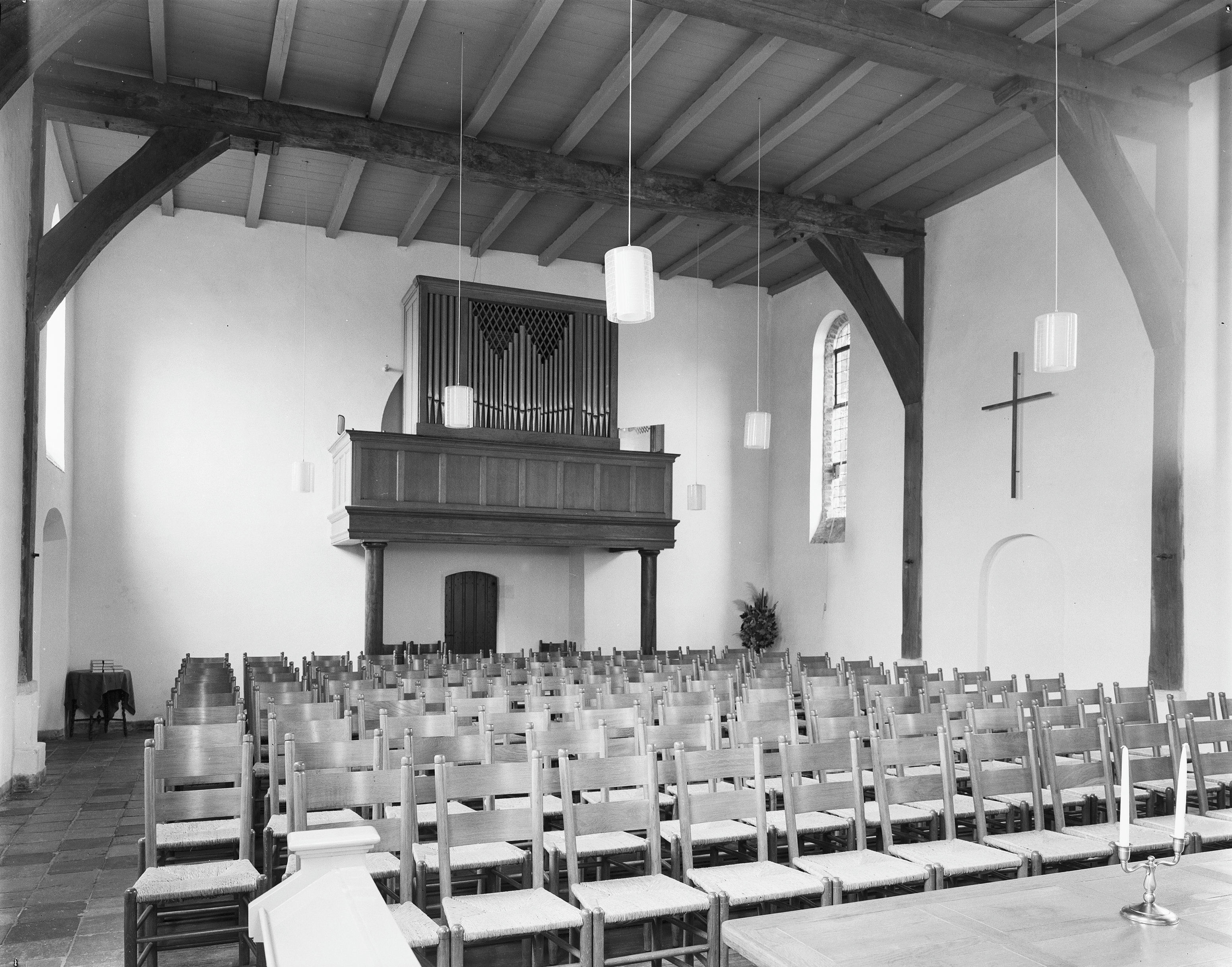 Nederlands Hervormde Kerk: interieur naar het orgel